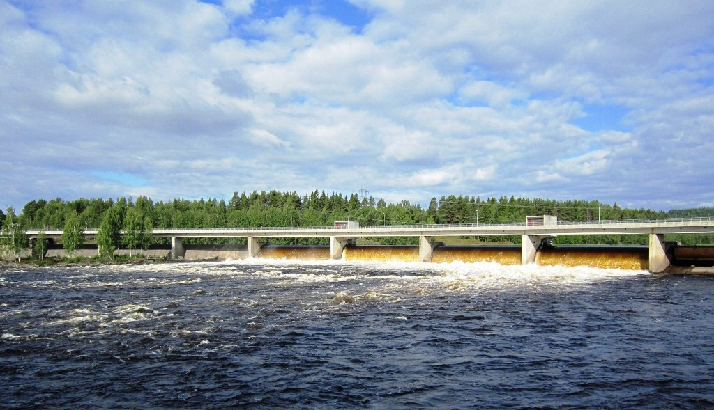 Skjefstadfossen med veibro over Glomma sør for Elverum